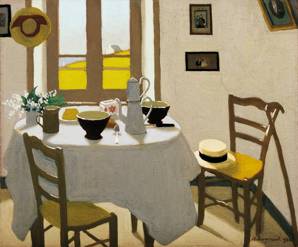 La chambre blanche par le peintre suisse Marius Borgeaud, 1924, huile sur toile, collection privée, CR 289.